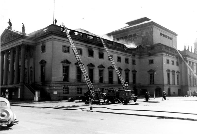 Brand der Staatsoper Berlin 1941 (Luftangriff), Feuerschutzpolizei Berlin im Einsatz